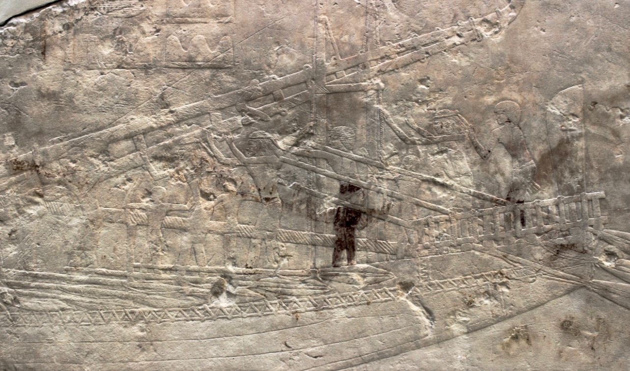 Berlín. Neues Museum. Relieves del templo funerario del faraón Sahure (V d.).